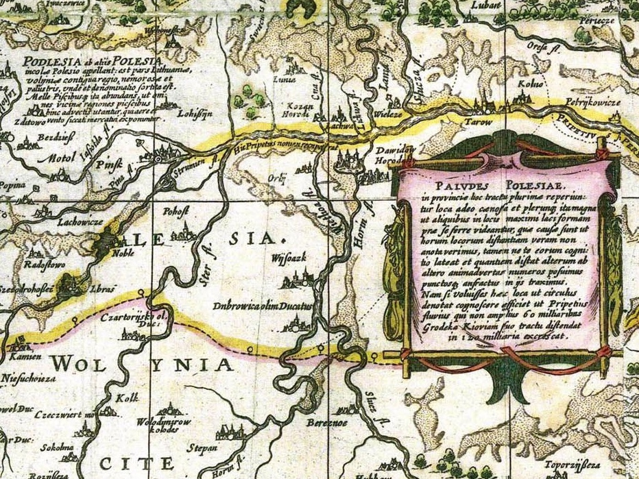 Фрагмент карты "Magni Ducatus Lithaniae". Нижнее течение Горыни и прилегающий участок Припети